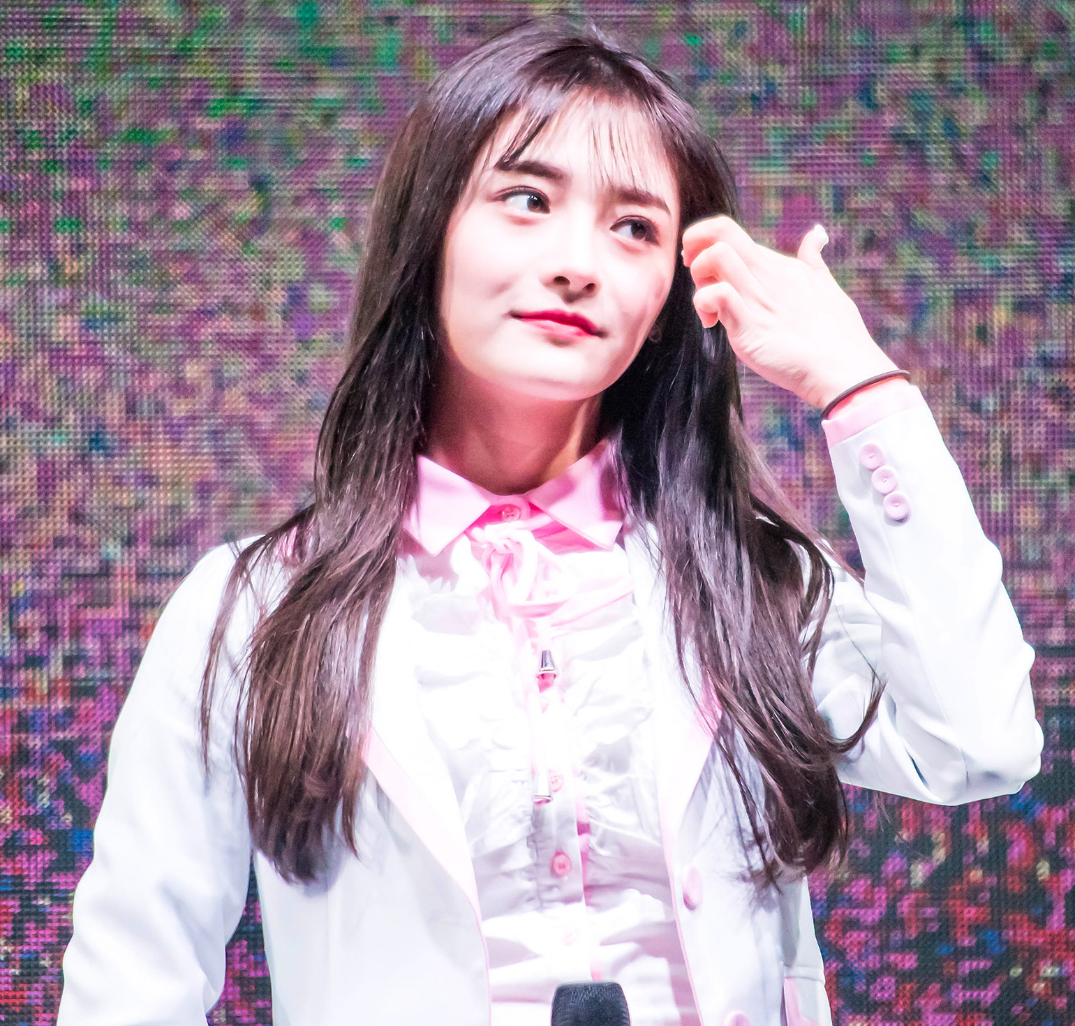 161219 불빛거리 출정식 아이오아이 직찍 업로드